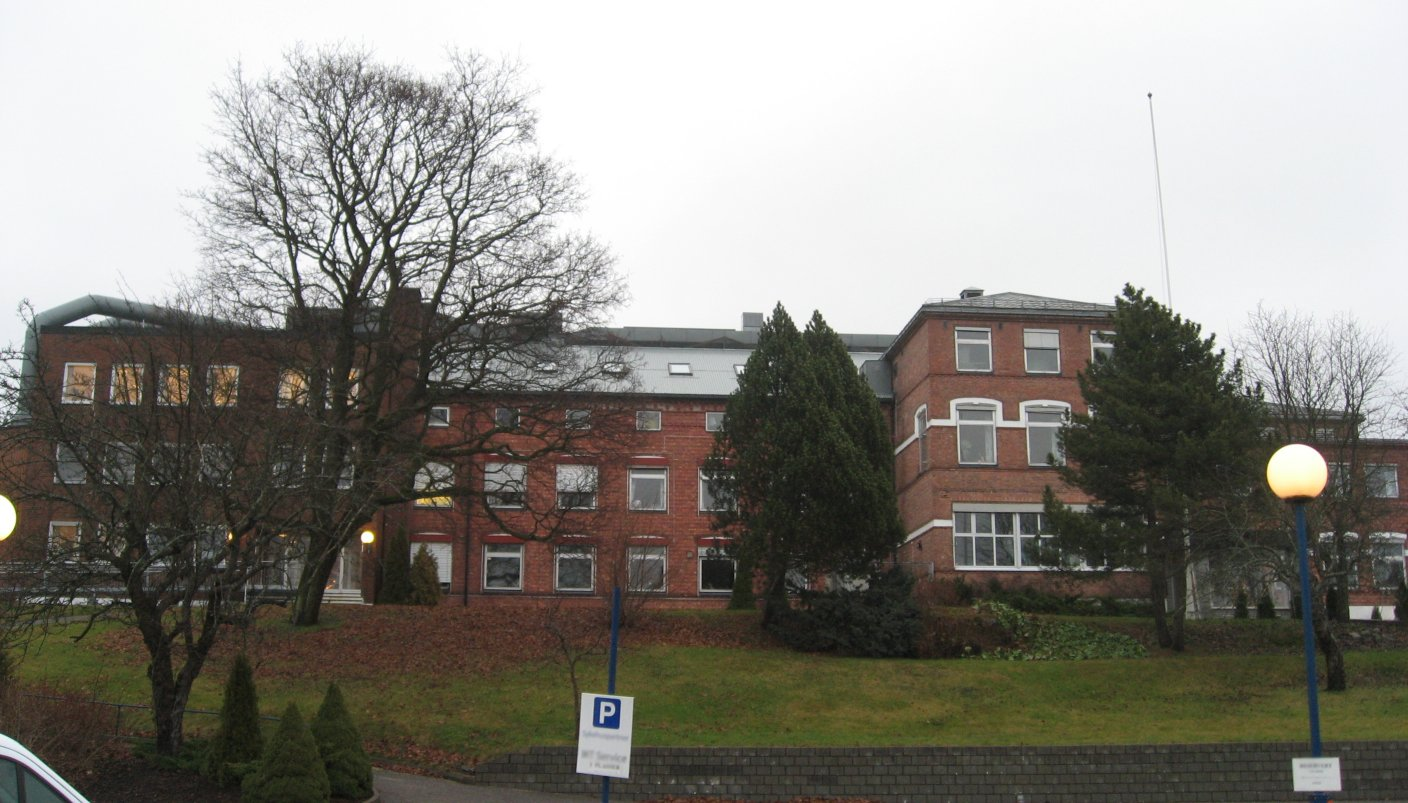 T.H. Marthinsen Sølvvarefabrikk, Tønsberg, Norway